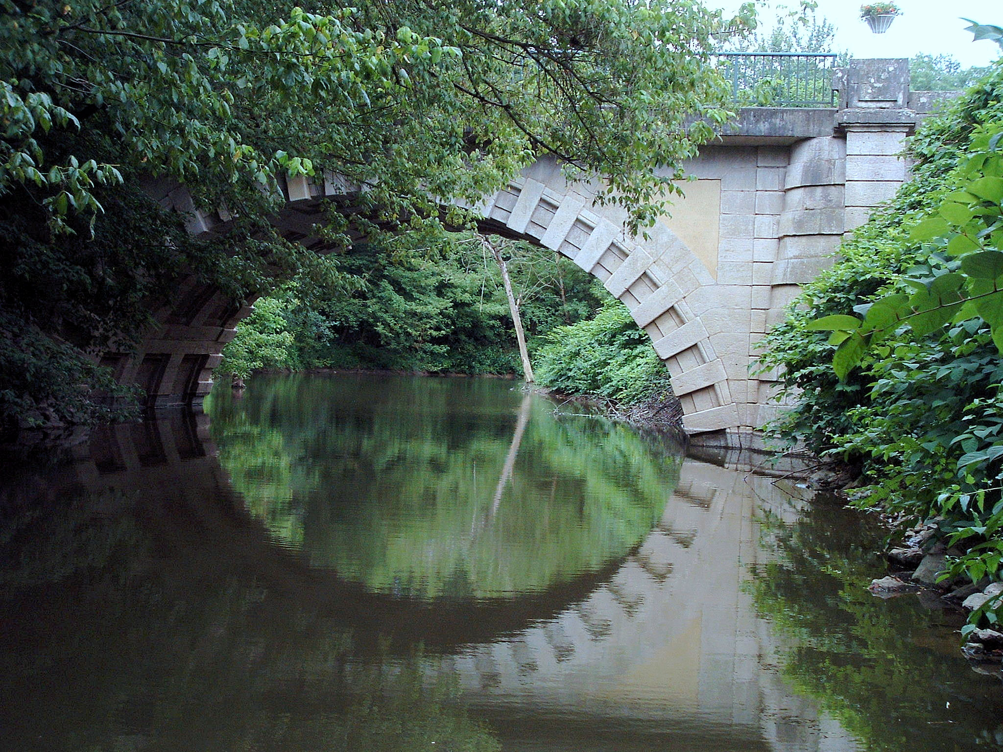 Navilly - Pont sur la Guyotte - Vu de l'aval